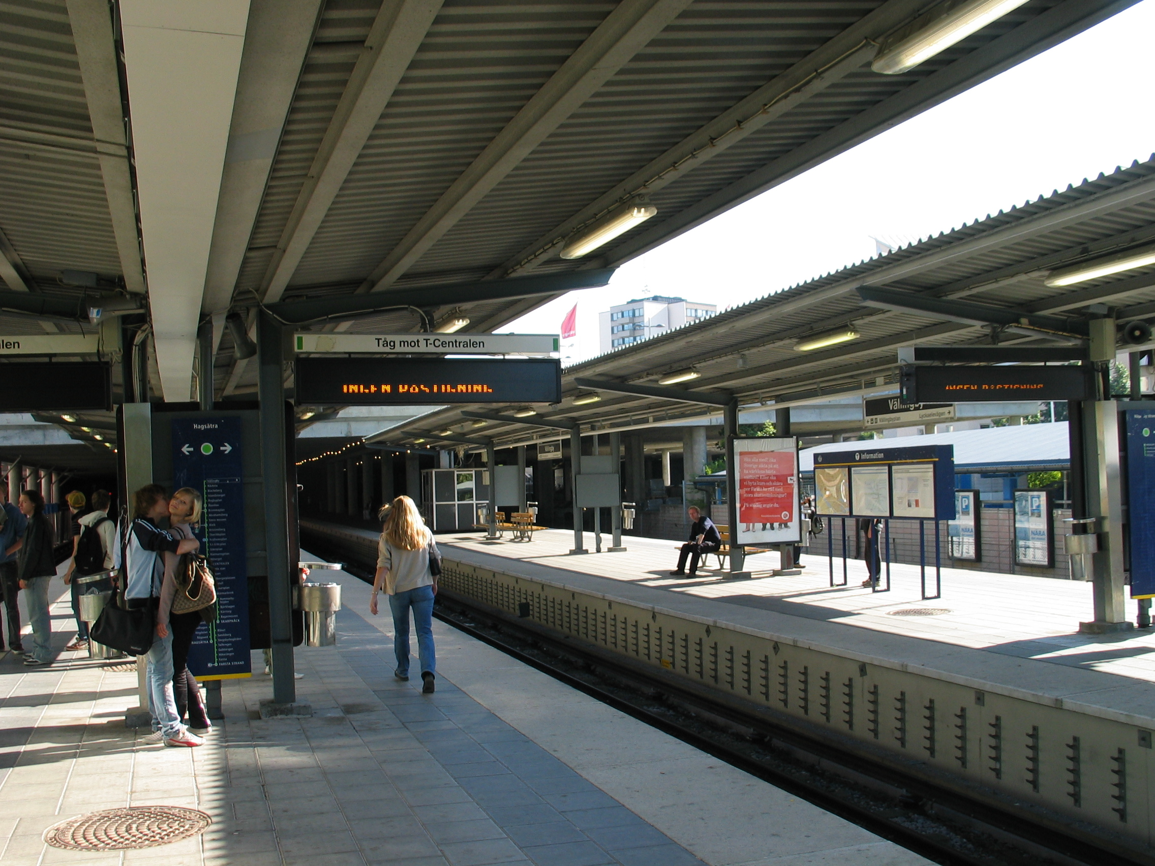 Vällingby, a metro station in Stockholm, Sweden.